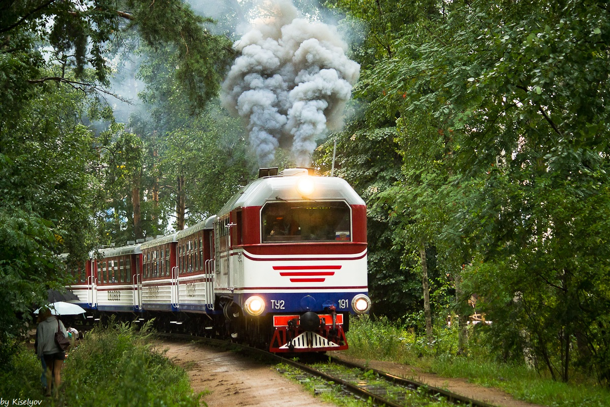 Дымящий тепловоз ТУ2-191 с поездом, Cеверная линия Малой Октябрьской железной дороги, Санкт-Петербург, Россия